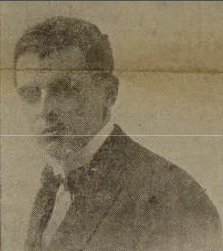 photo de Goulven Mazéas publiée le 22 mars 1930 par Breiz Atao